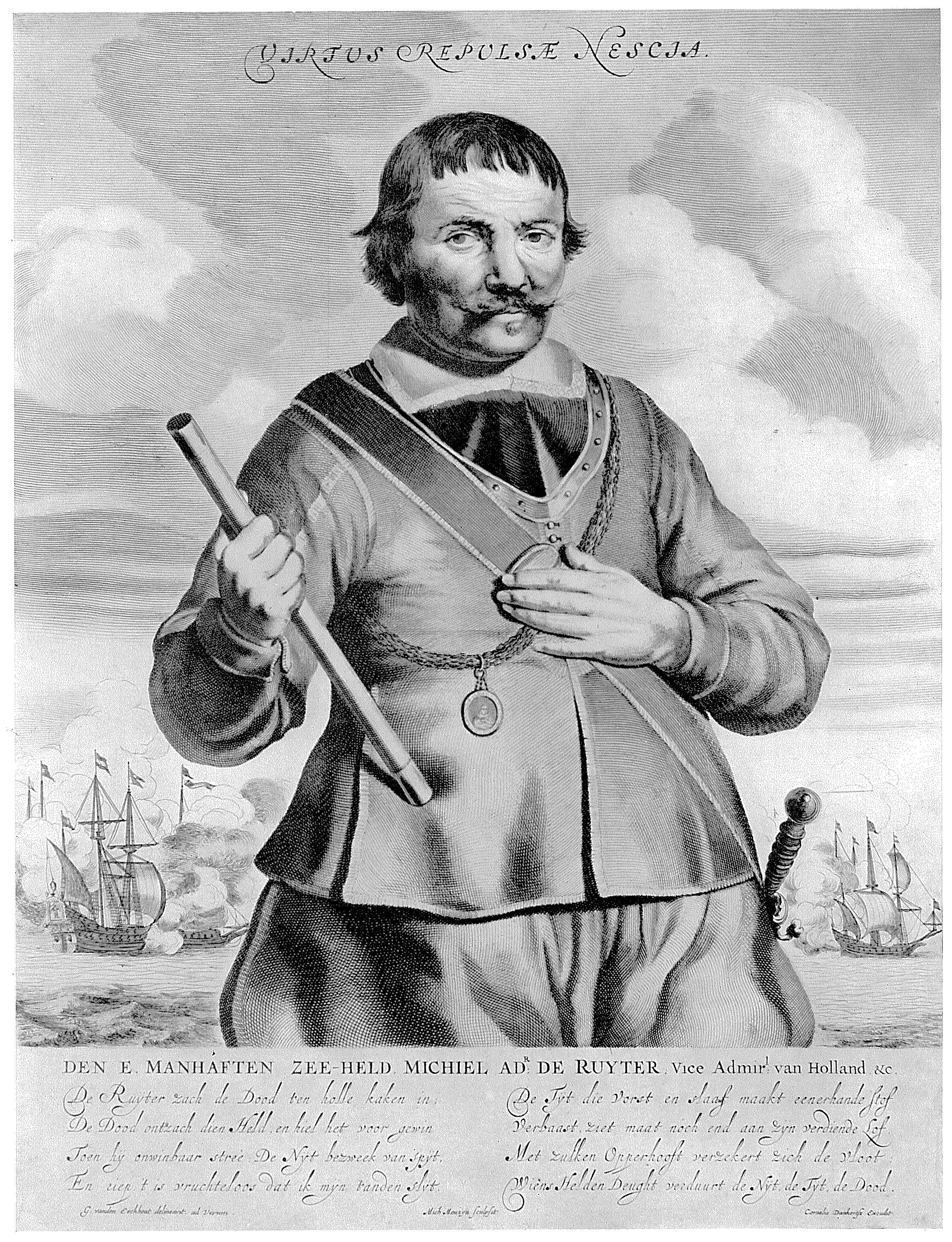 Michiel de Ruyter. Gravure naar het leven van Gerbrand van den Eeckhout omstreeks 1654. Scheepvaartmuseum Amsterdam. Gevonden in N. Aartsma, Michiel de Ruyter, 1943